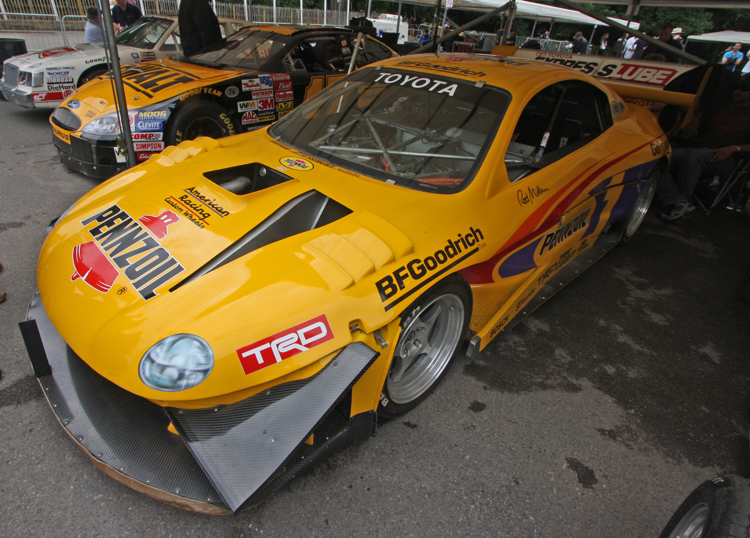 Built 1994. 2 litre 4 cylinder